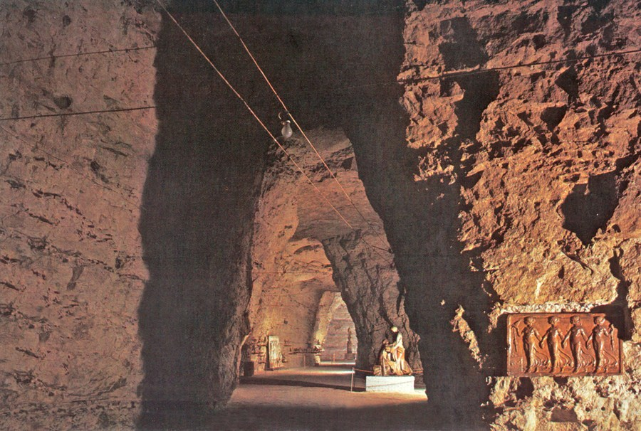 Minegang i Thingbæk Kalkminer